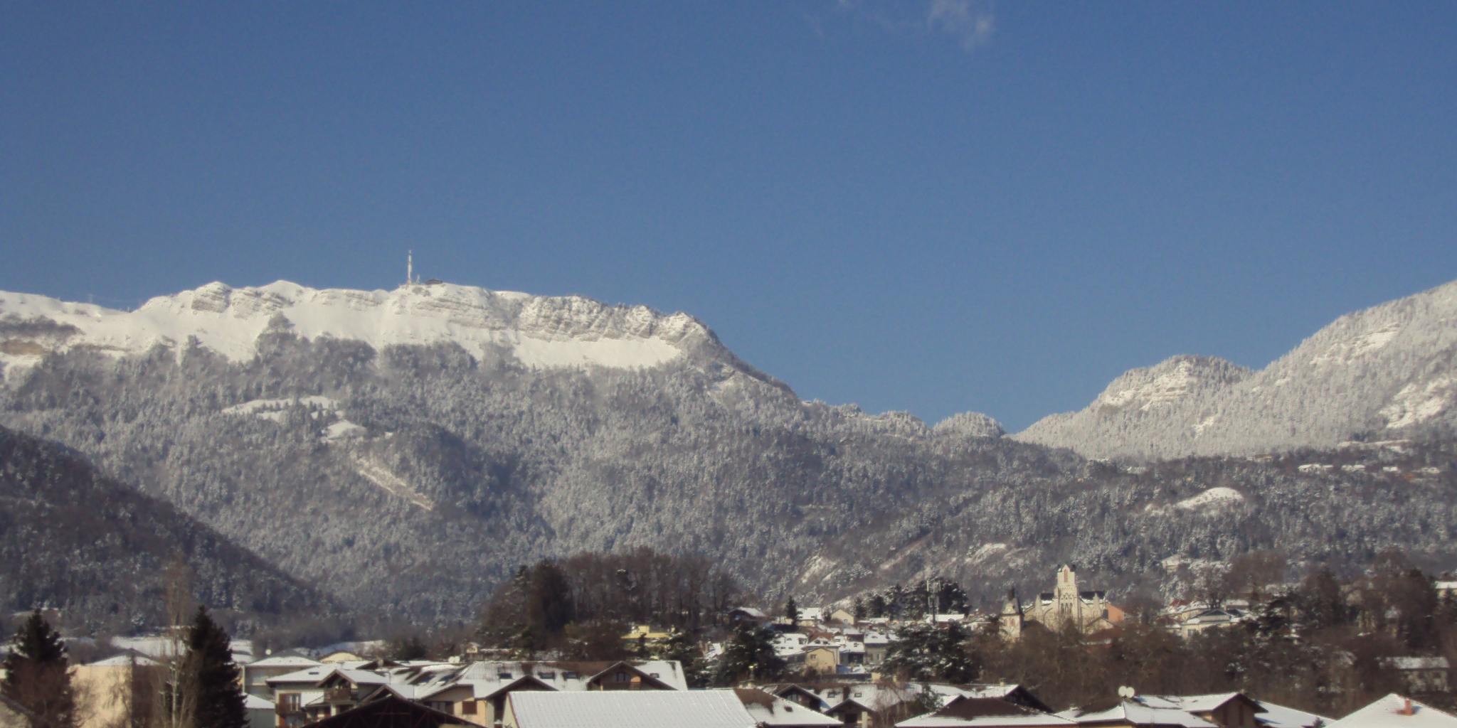 Le Petit Mont Rond (ou Montrond) et le col de la Faucille au dessus de la ville de Gex (Ain, France) en hiver.